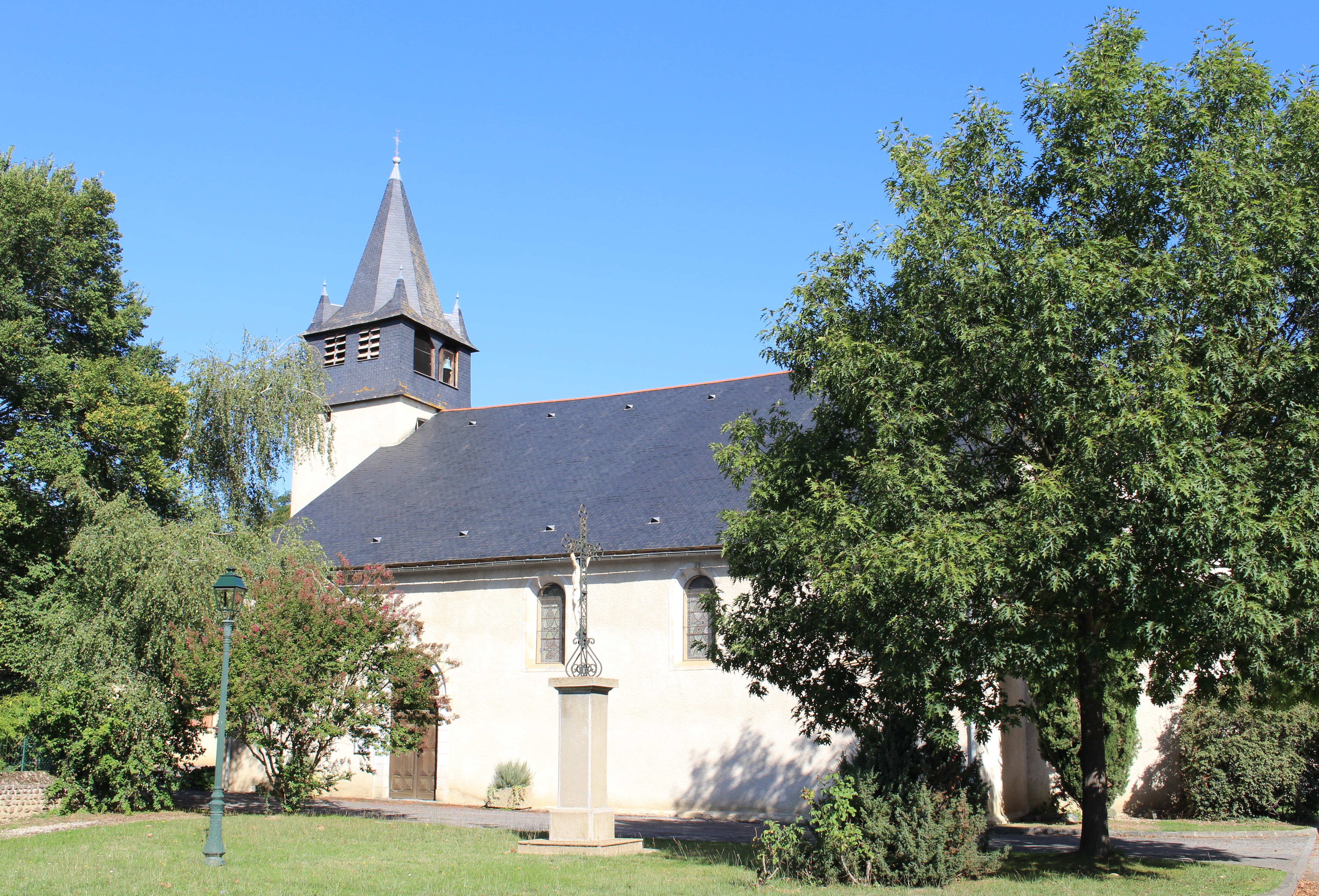 Église Saint-Martin d'Aubarède (Hautes-Pyrénées)